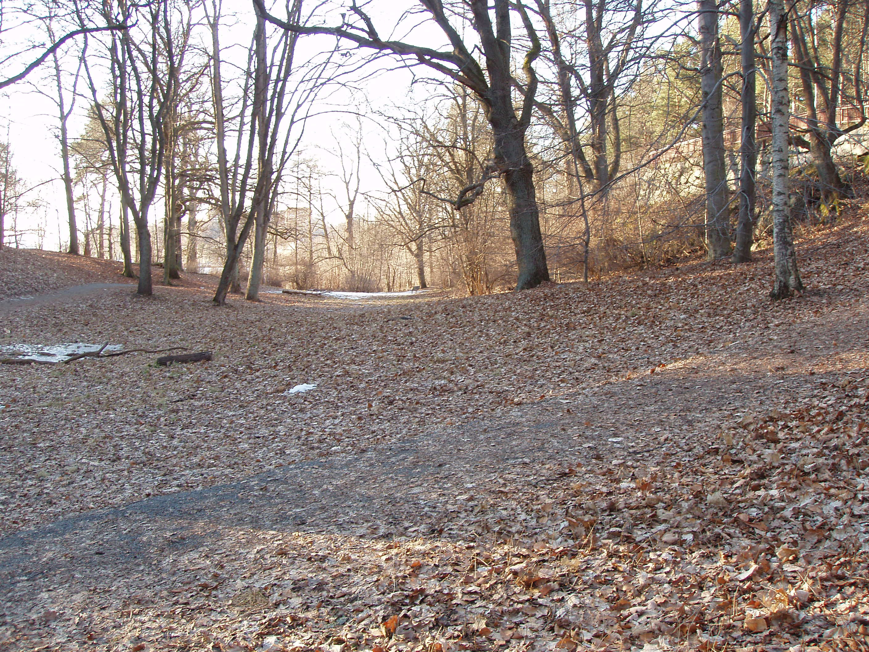 Dalsänkan mot väster vårvinter 2009 i Kappsta naturreservat nedanför platsen där Raoul Wallenbergs föddes i familjens sommarhus i Kappsta.